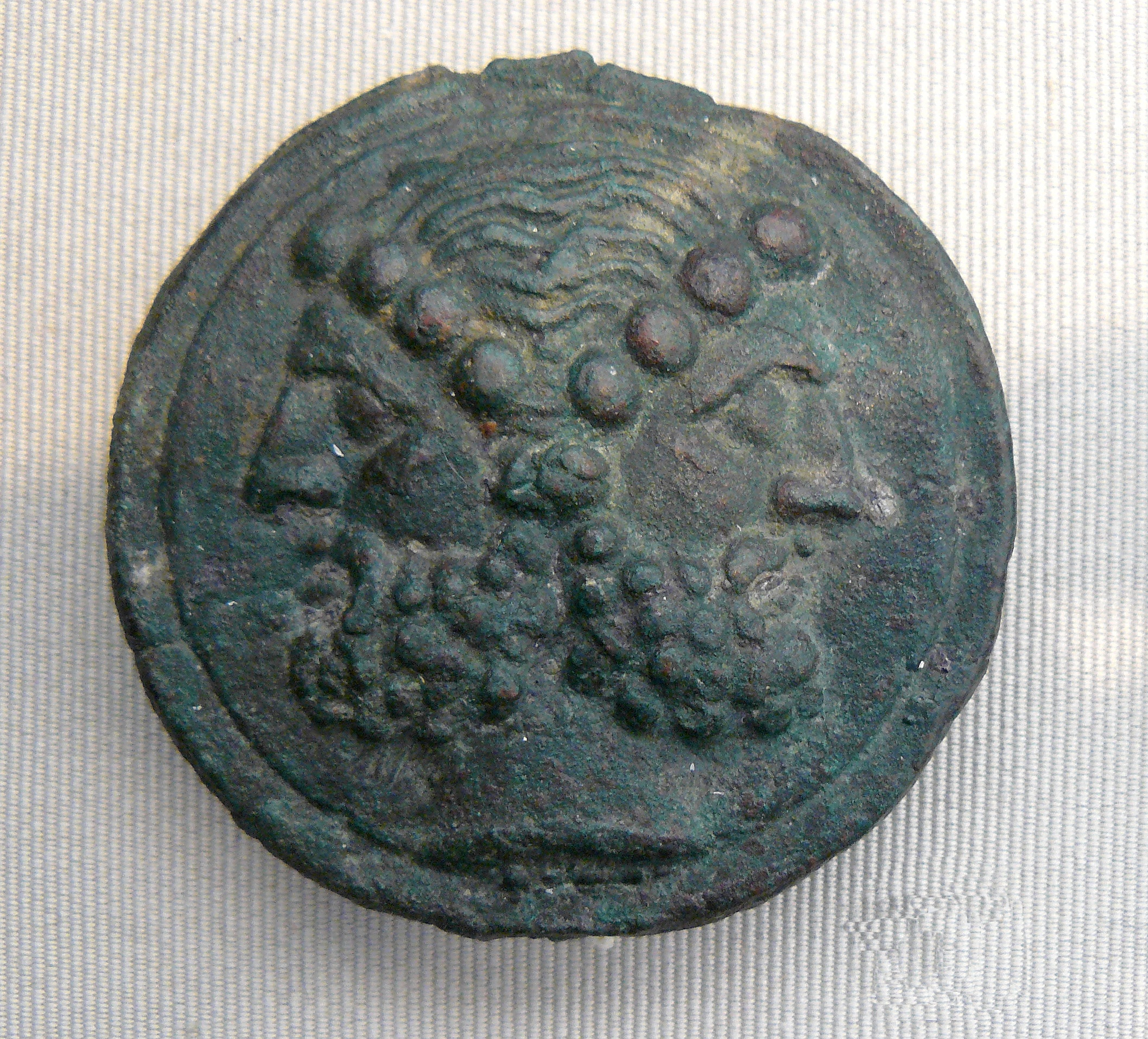 Aes grave, monnaie de la république romaine en bronze, vers -225, poids 254,64 gr, diamètre environ 7 cm - Ailly 44 - Cabinet des médailles, Paris